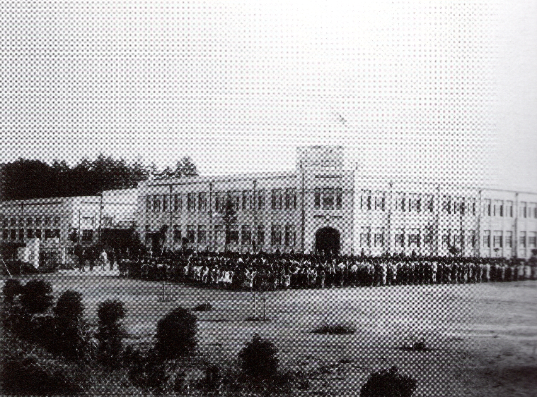 岡崎市三島尋常高等小学校（現・岡崎市立三島小学校）。1928年撮影。